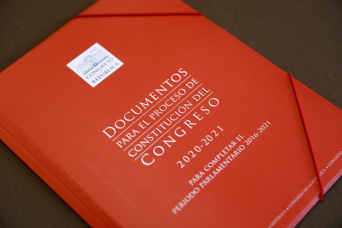 Documento Oficial del Proceso de constitución del Congreso 2020-2021